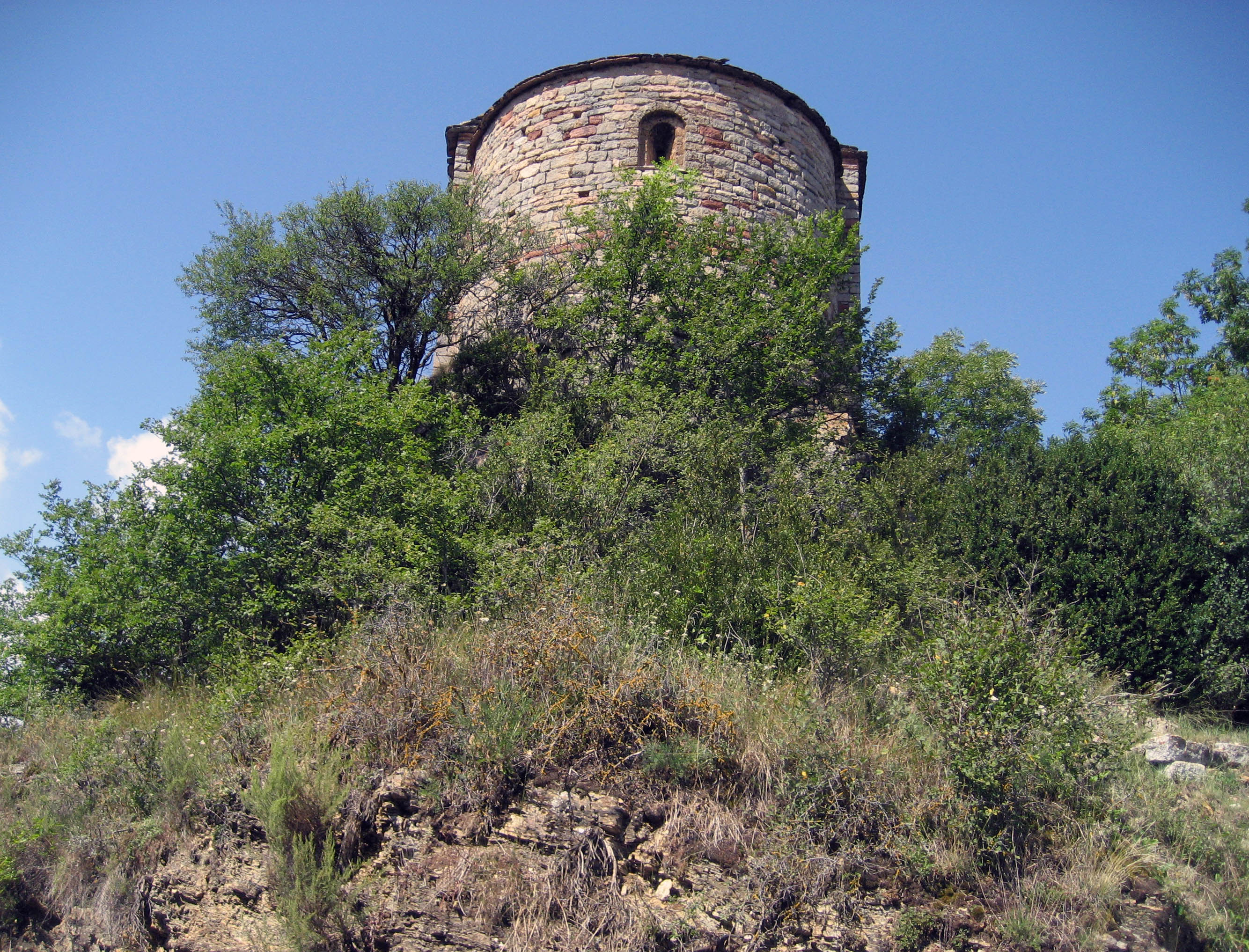 Ábside la iglesia de Sant Julià de Pedra en la Baja Cerdaña (Cataluña) España